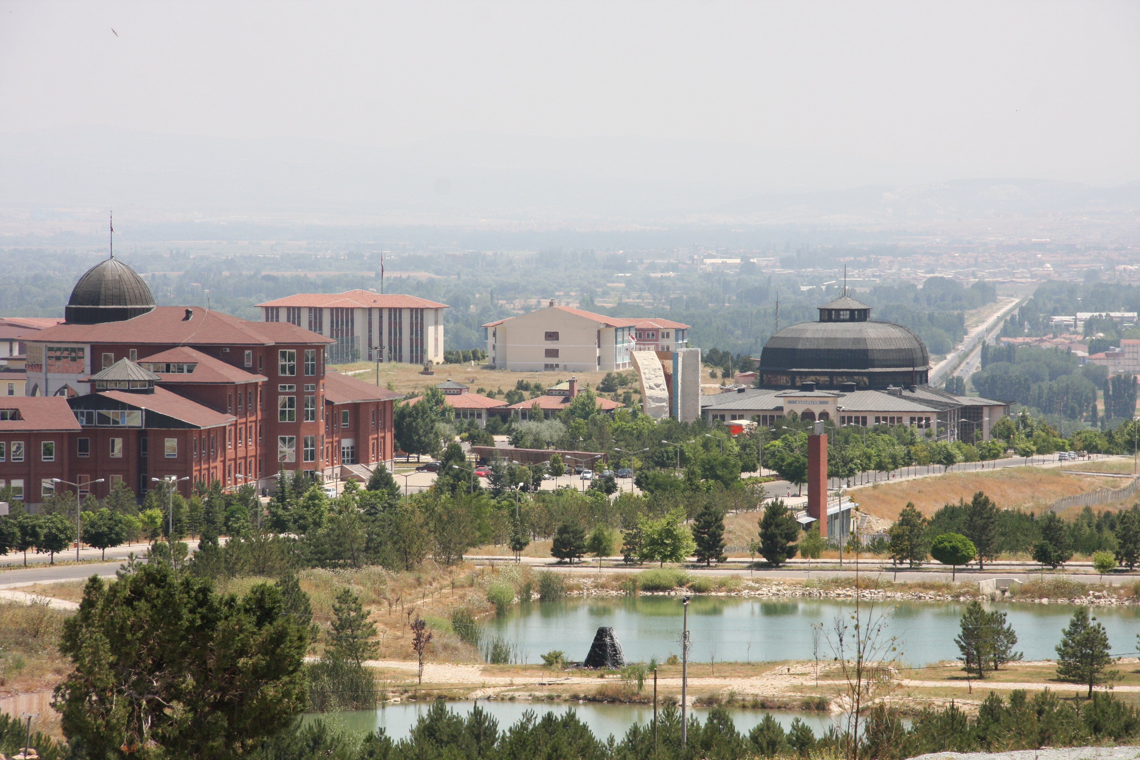 Kütahya Dumlupınar Üniversitesi Evliya Çelebi Yerleşkesi. Solda rektörlük binası, gölet, sağda Bedesten, orta arkada İktisadi ve İdari Bilimler Fakültesine ait derslikler, rektörlük binasının arkasında eski rektörlük binası, en arkada Kütahya şehri.